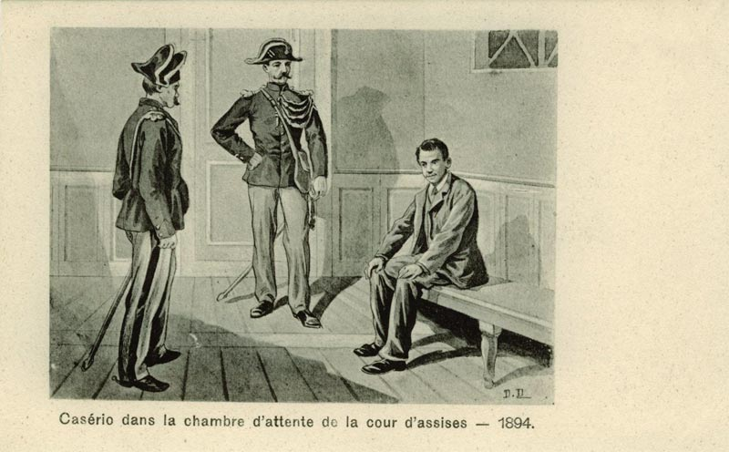 Casério dans la chambre d’attente de la cour d’assises - 1894.